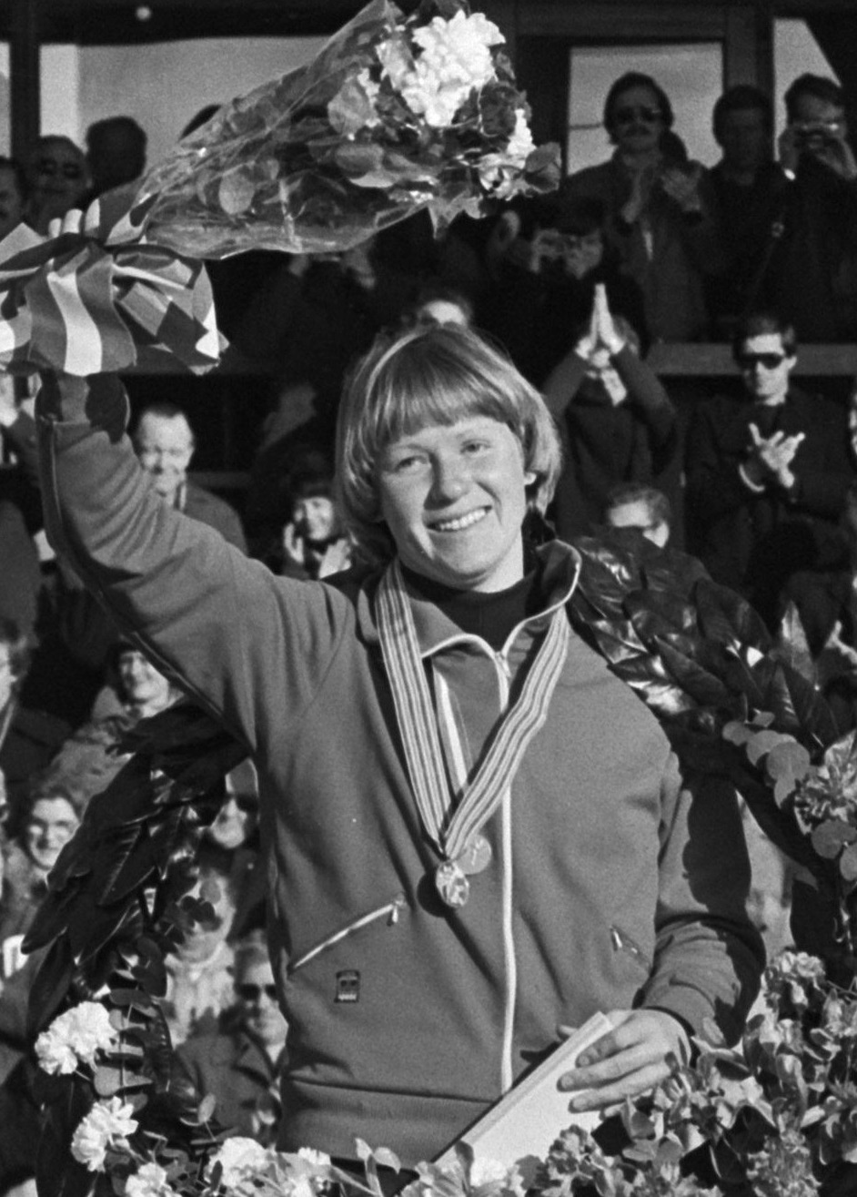 Sylvia Burka. Wereldkampioenschap schaatssprint in Alkmaar